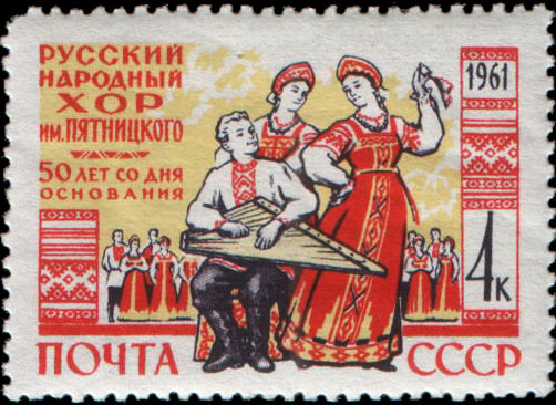 50-летие со дня основания Государственного русского народного хора имени М. Е. Пятницкого. Художник: Е. Комаров. Марка СССР, номинал - 4к.